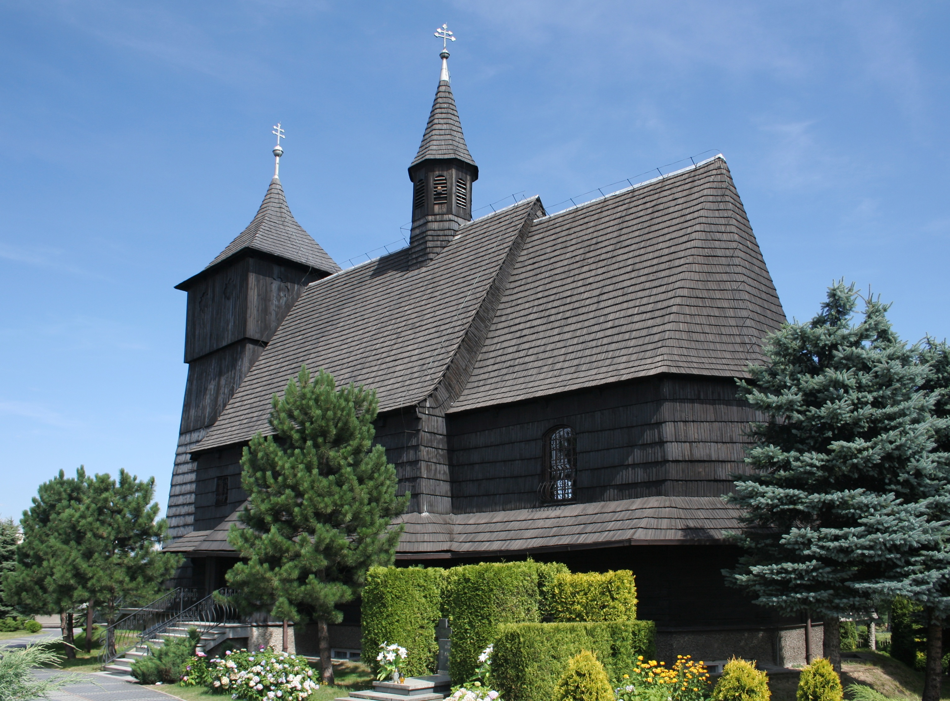 Kościół pod wezwaniem św. Katarzyny i Matki Boskiej Różańcowej w Wielopolu, dzielnicy Rybnika.